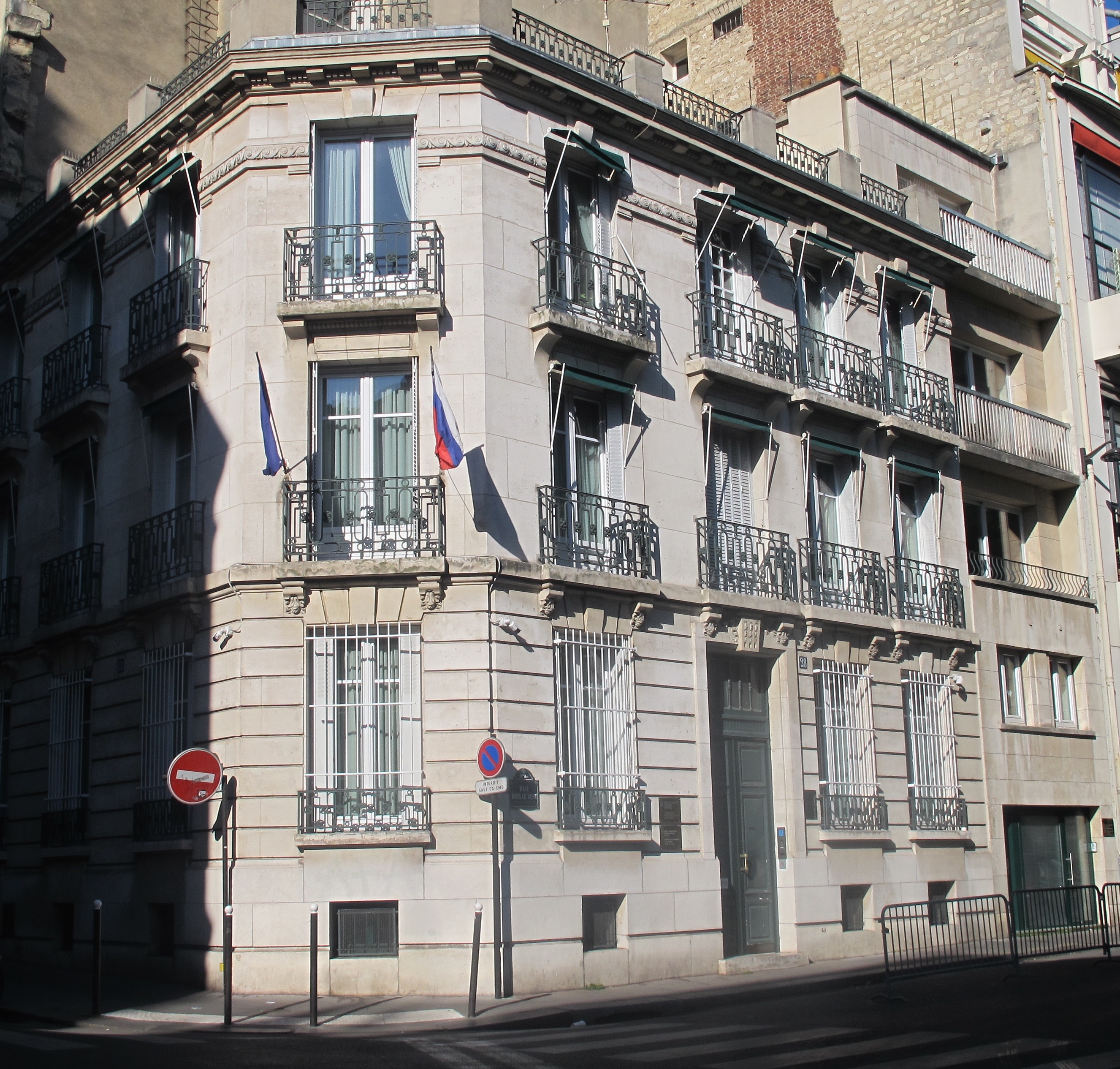 Ambassade de Slovénie en France, 28 rue Bois-Le-Vent (Paris, 16e).